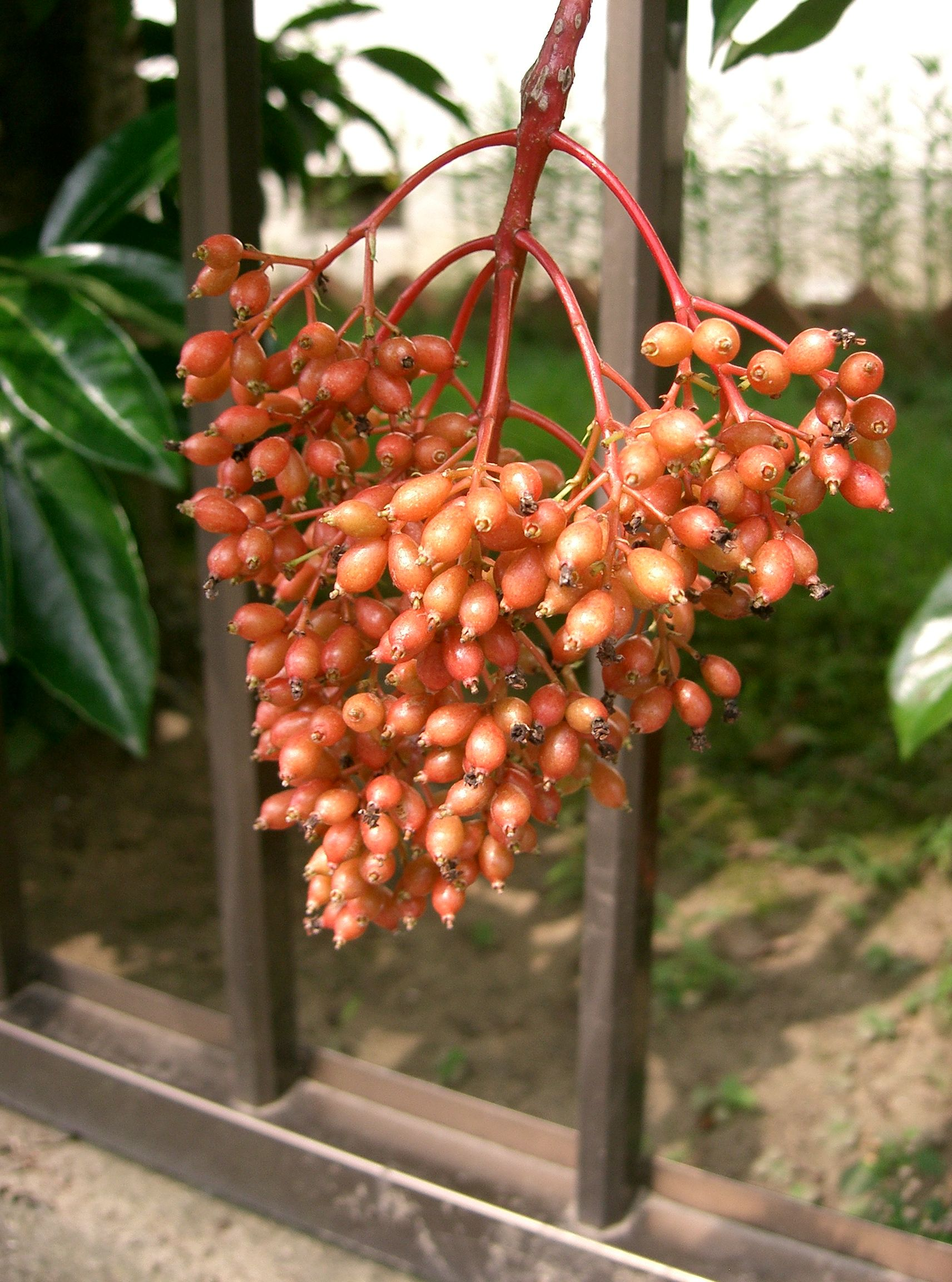 Viburnum odoratissimum var. awabuki（synonym: V. awabuki)